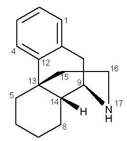 Morfinan.